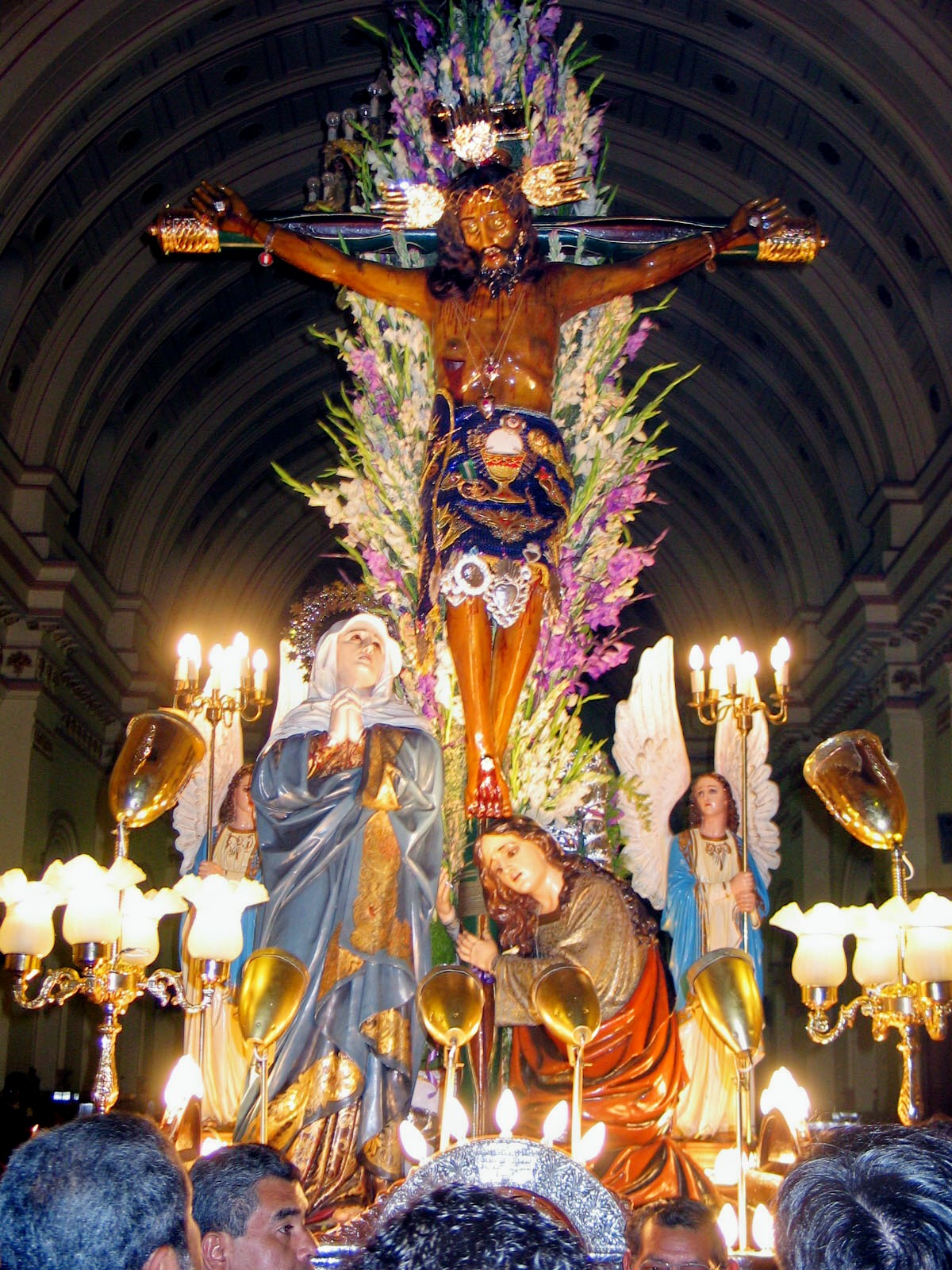 Imagen del Señor de Luren de Ica